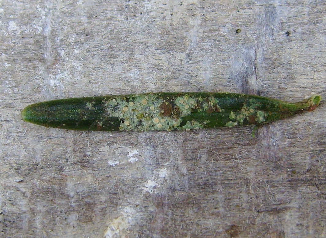 Fellhanera bouteillei, Pont Neuf - Pont Callec (Berné, Morbihan, Betagne, France)